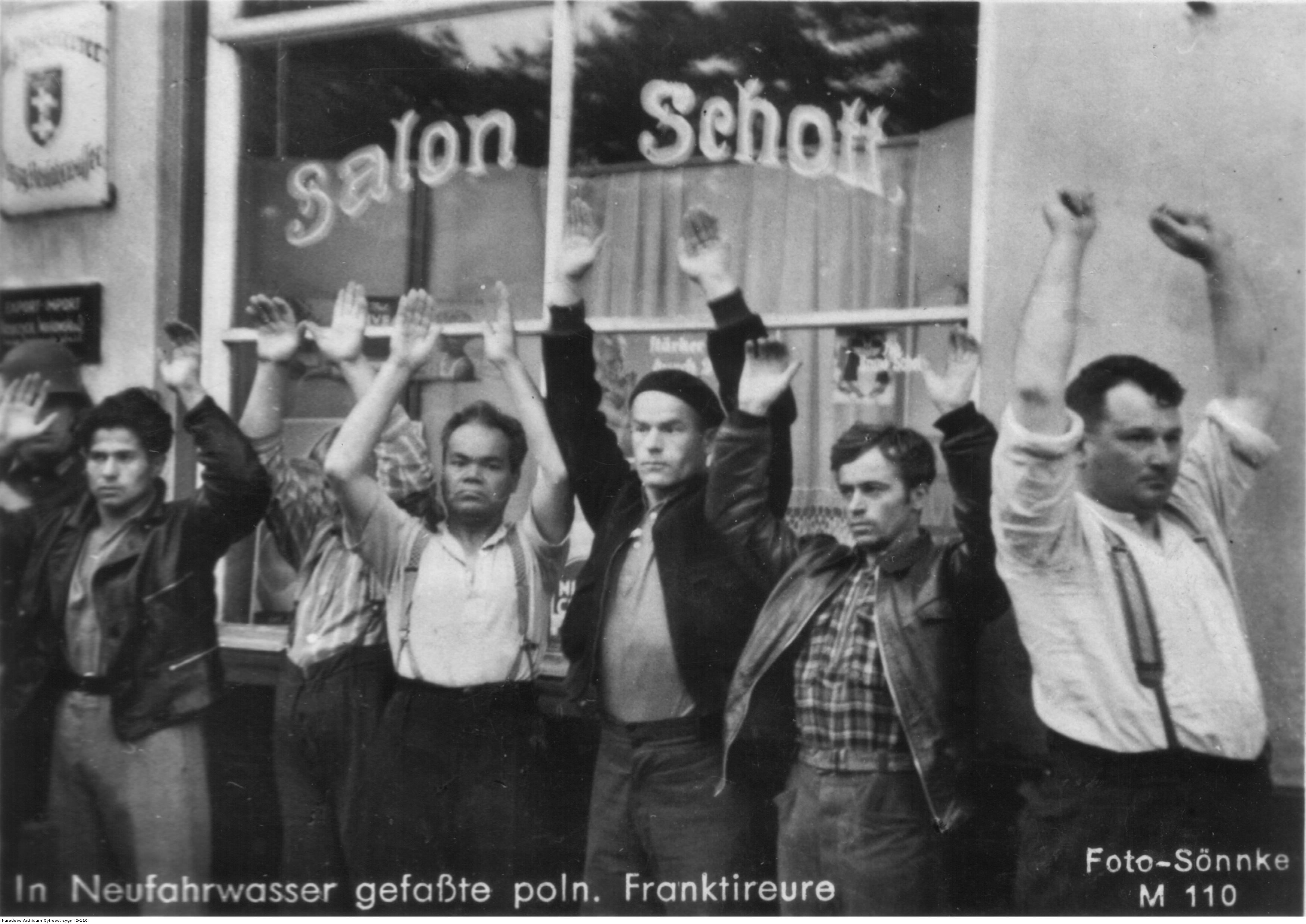 Grupa cywilów, polskich mieszkańców Gdańska schwytana przez Niemców w czasie zajmowania miasta stoi z rękami podniesionymi do góry.